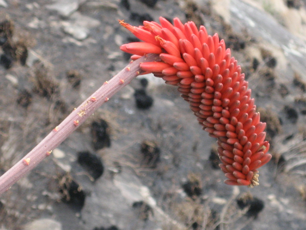 Inflorescence of Aloe decurva at Mount Zembe, Mozambique. 1000 m.a.s.